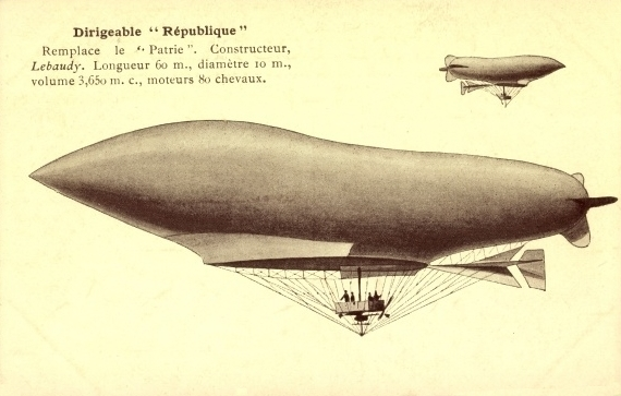 Le dirigeable «La République» (1908-1909), constructeur Pierre Lebaudy (1865–1929) (France)